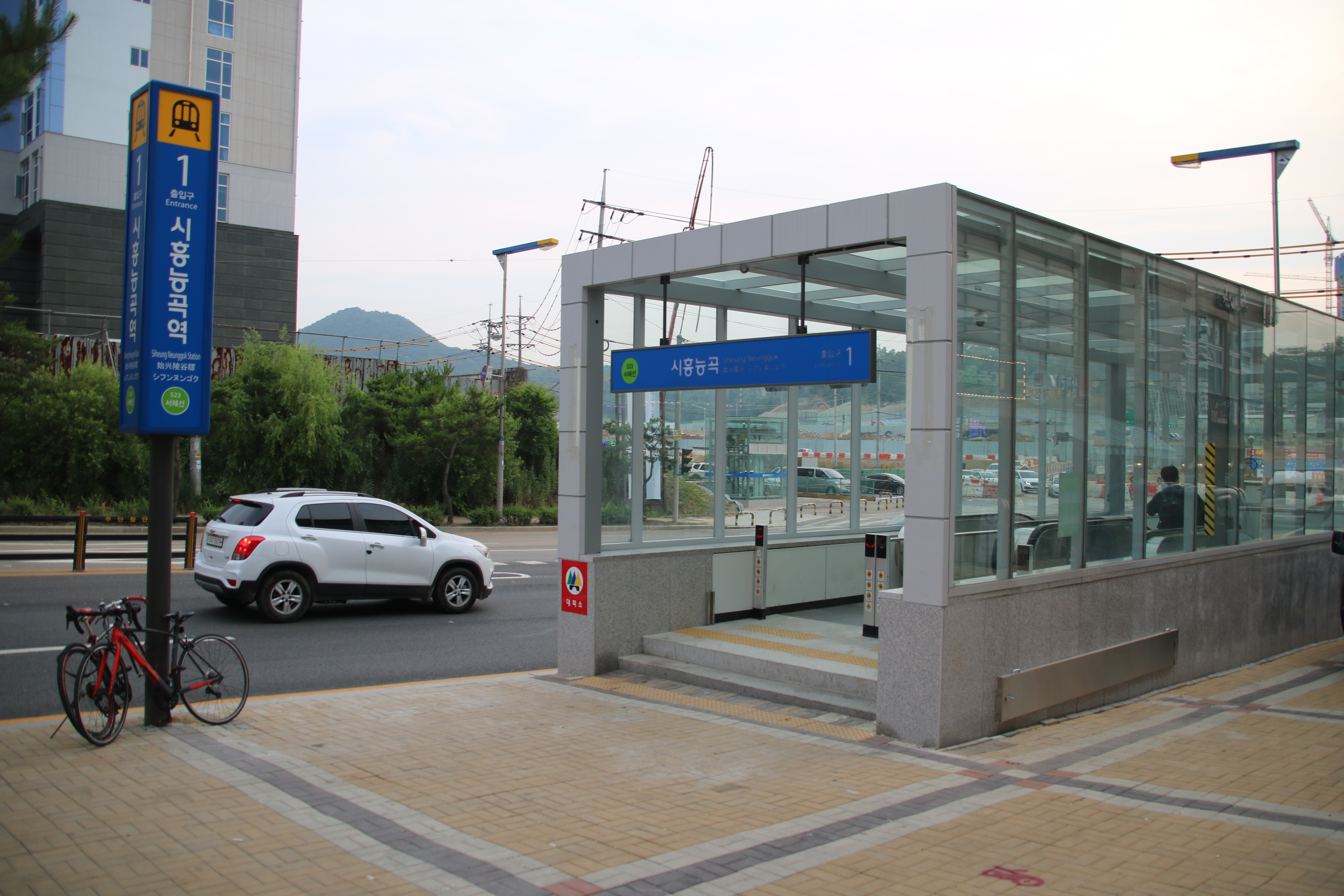 시흥능곡역 1번 출입구